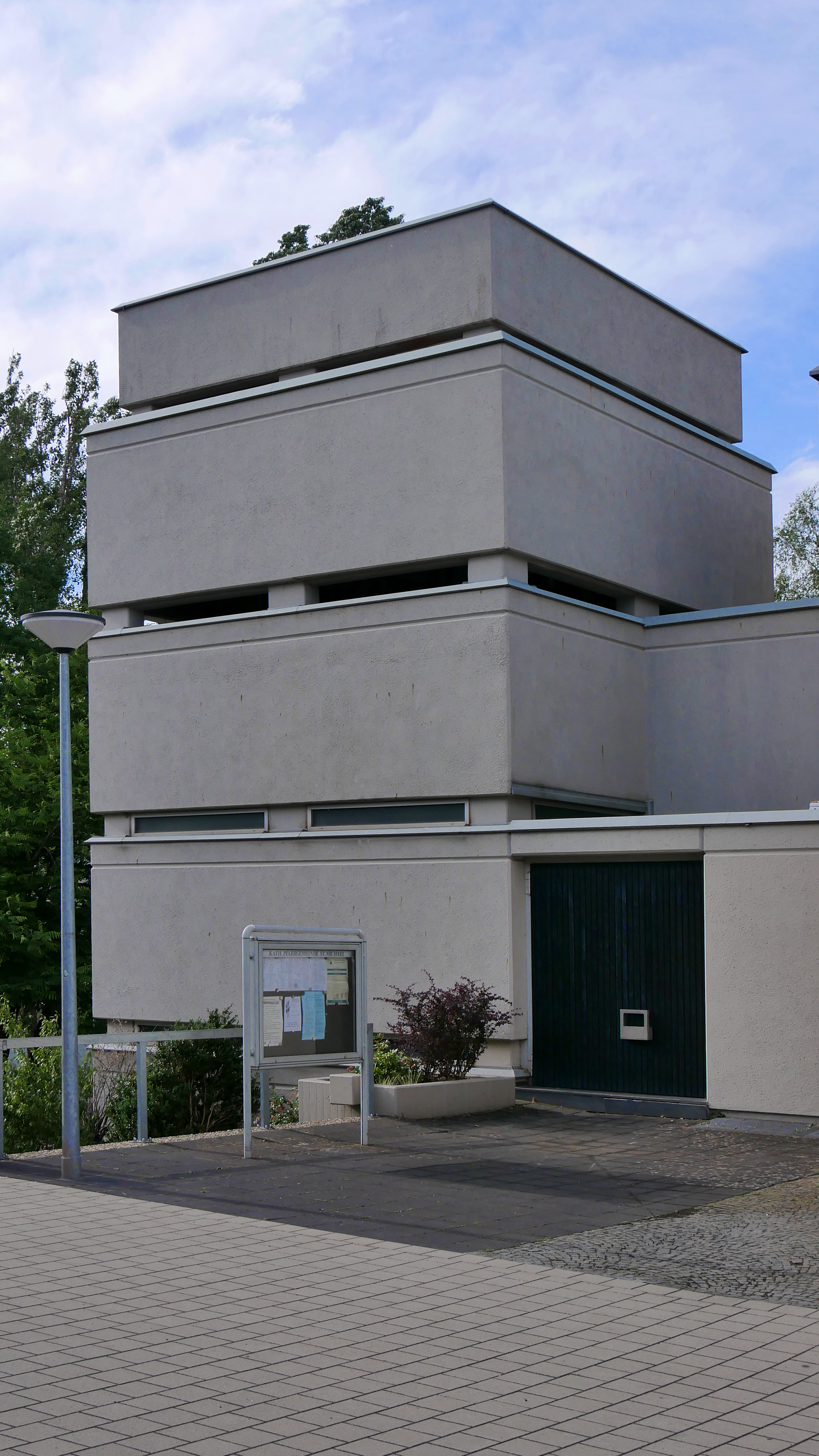 Glockenturm der Kirche St. Michael im Trierer Stadtteil Mariahof. Links an die Kirche angebaut und niedriger als diese